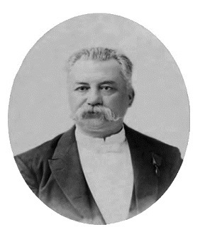 Naturalista chileno